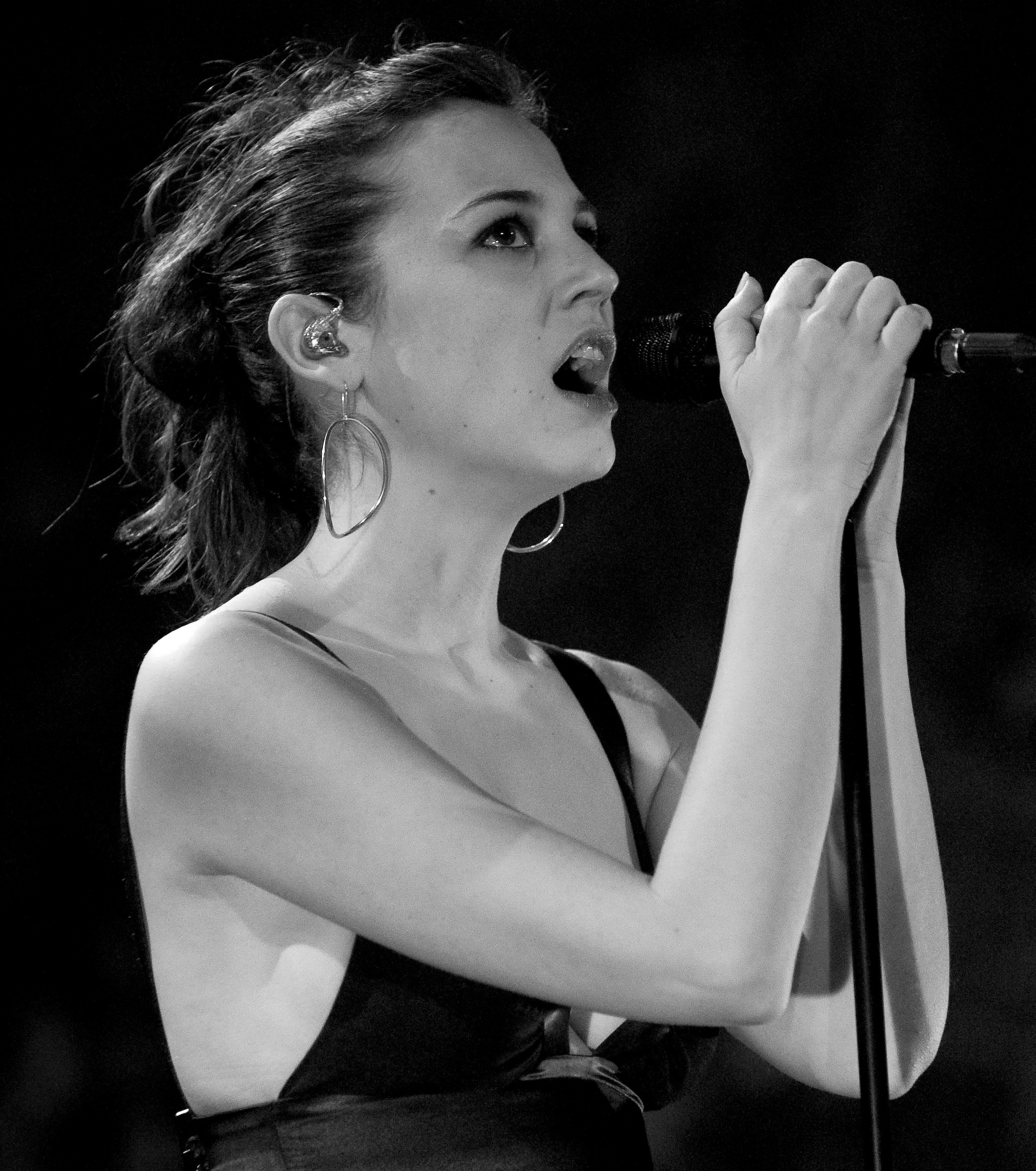 Marlango